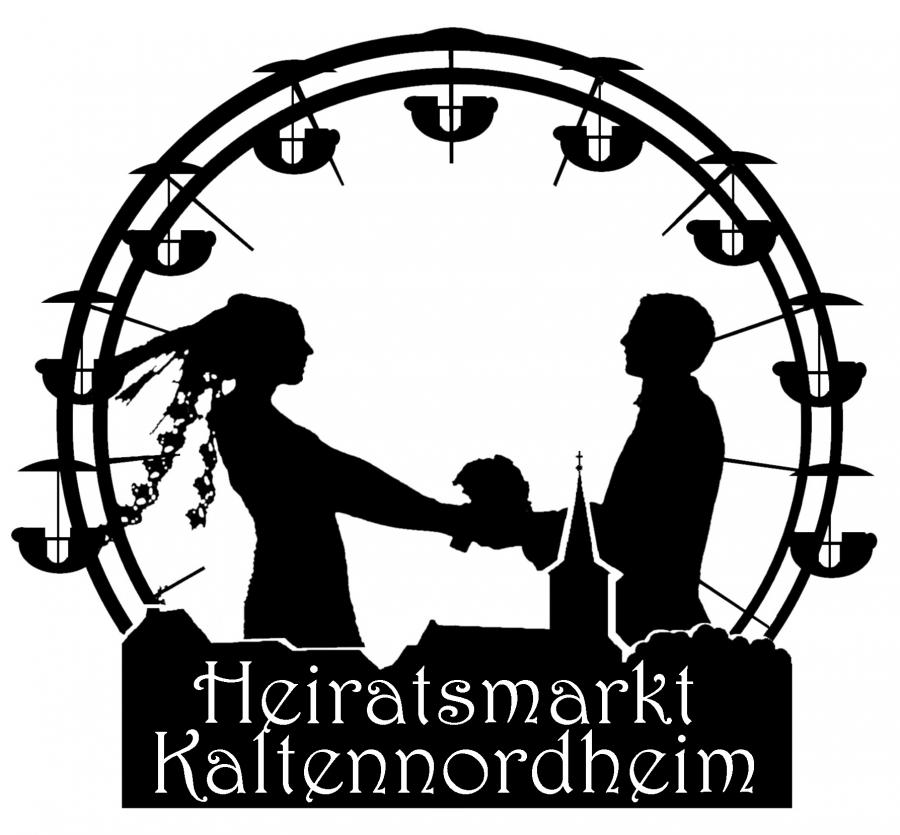 Das Logo zeigt ein Hochzeitspaar, Riesenrad und eine Silhouette der Stadt Kaltennordheim.